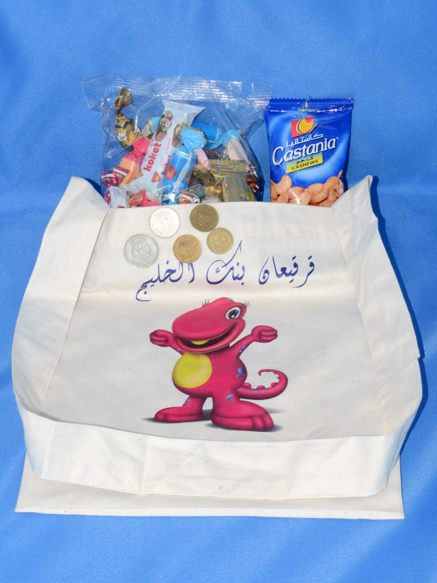 Girgian sak